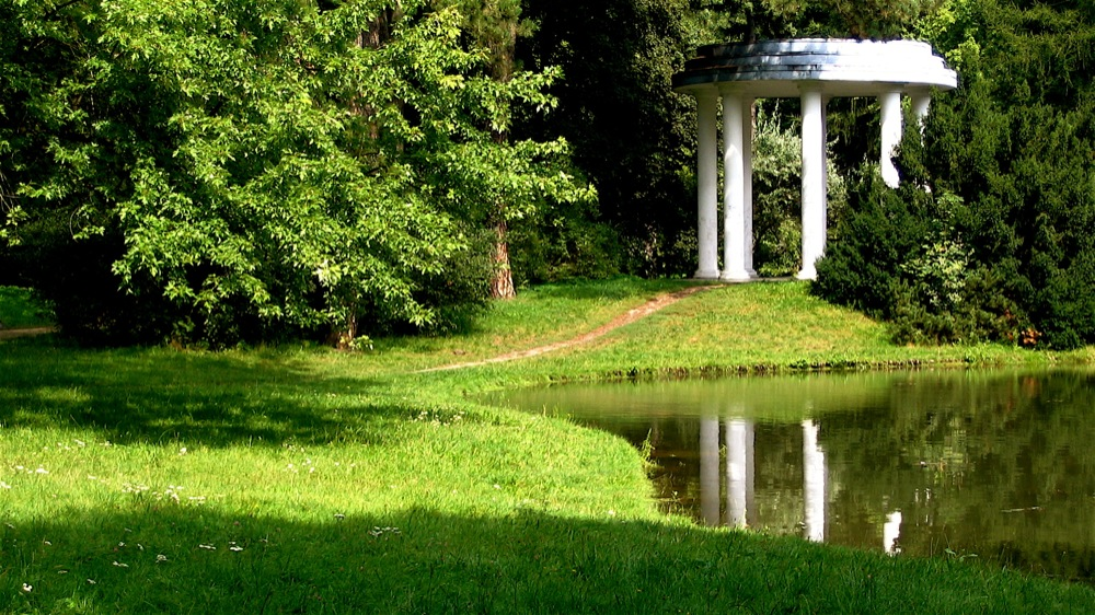 Park Poniatowskiego w Łodzi